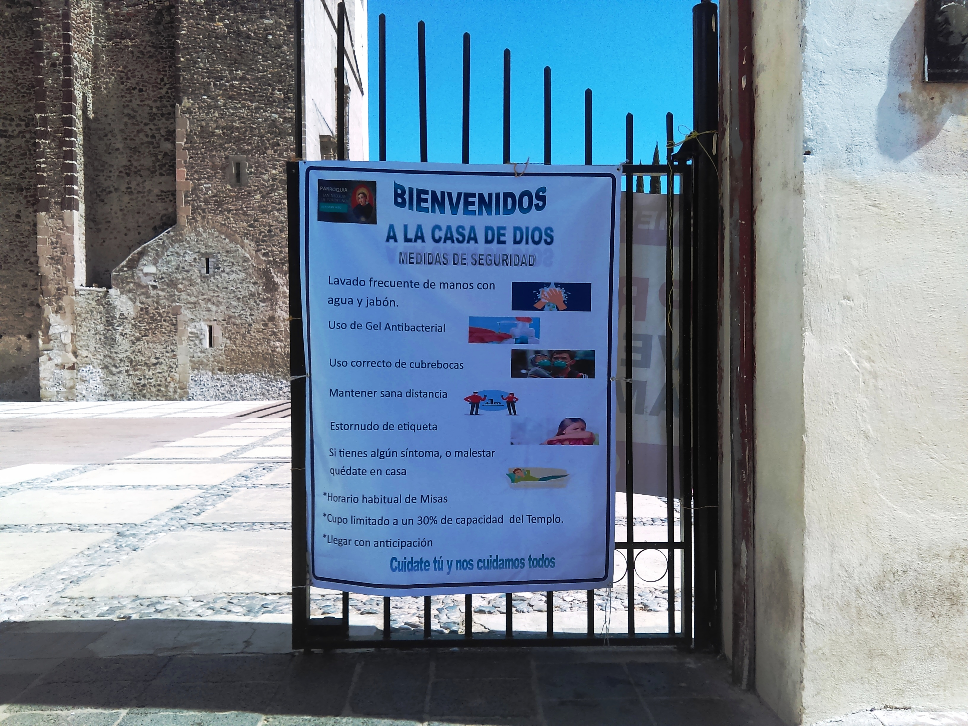 Espacios cerrados en Actopan.